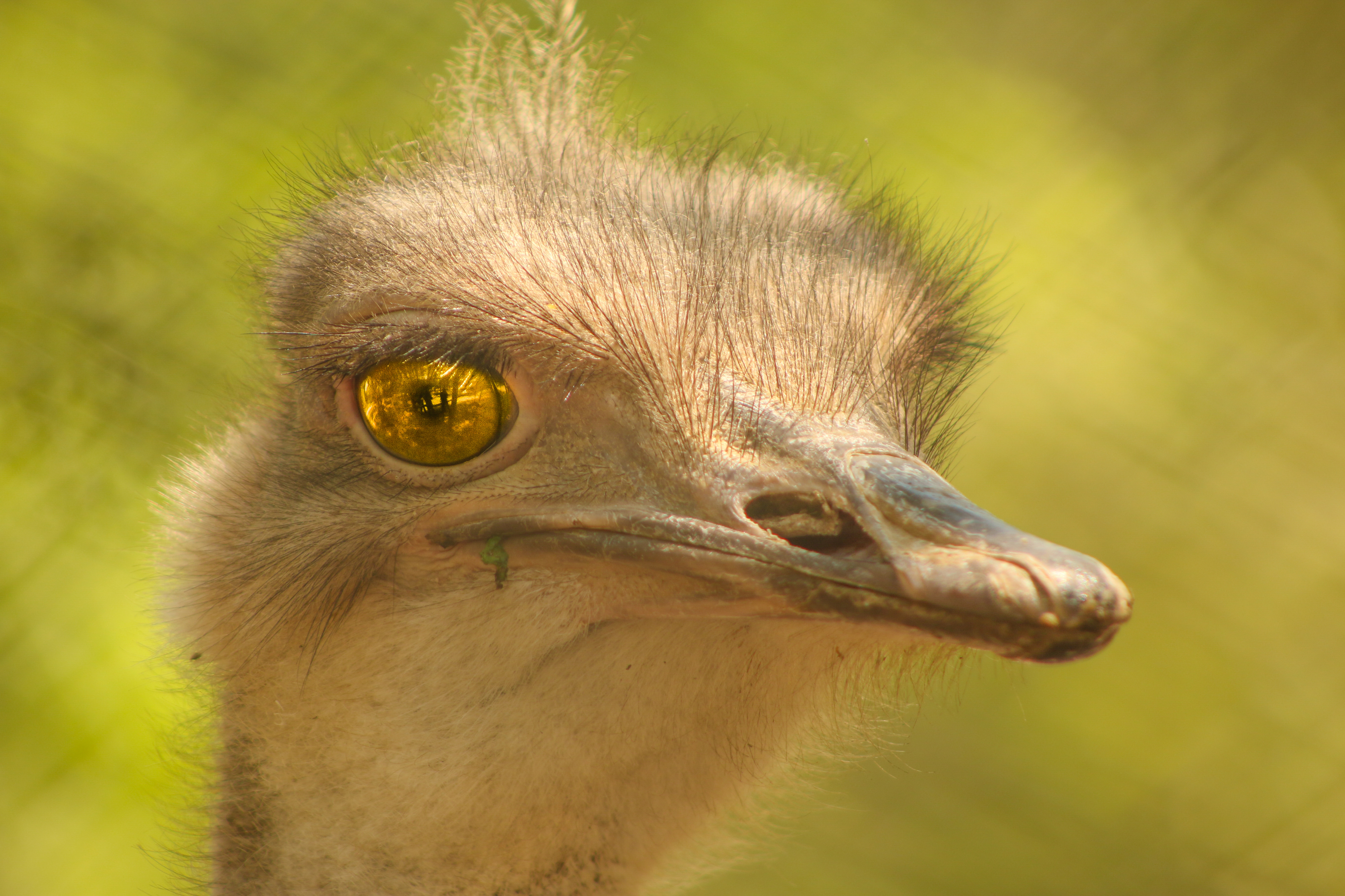 বঙ্গবন্ধু শেখ মুজিব সাফারি পার্ক